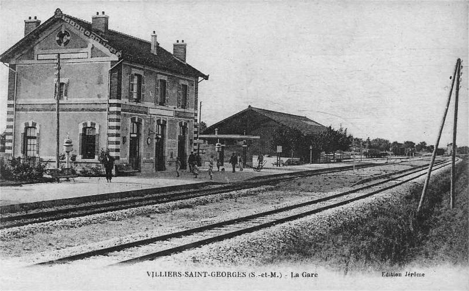 L'ancienne gare de Villiers-Saint-Georges : l'intérieur de la gare avec le bâtiment voyageurs et la halle à marchandises.